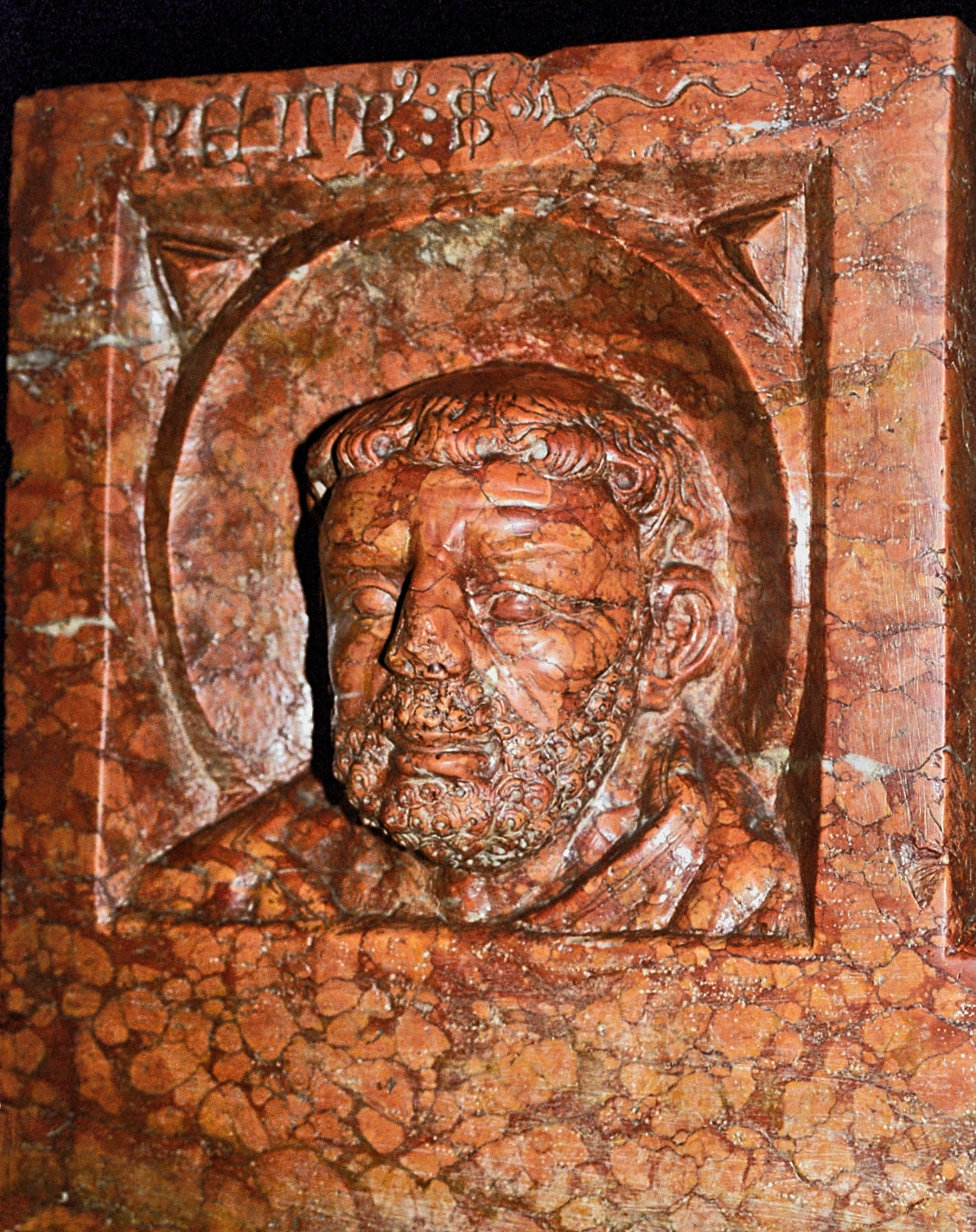 Italie - Lombardie - Brescia - Rotonda - Sarcophage de l'évêque Berardo Maggi